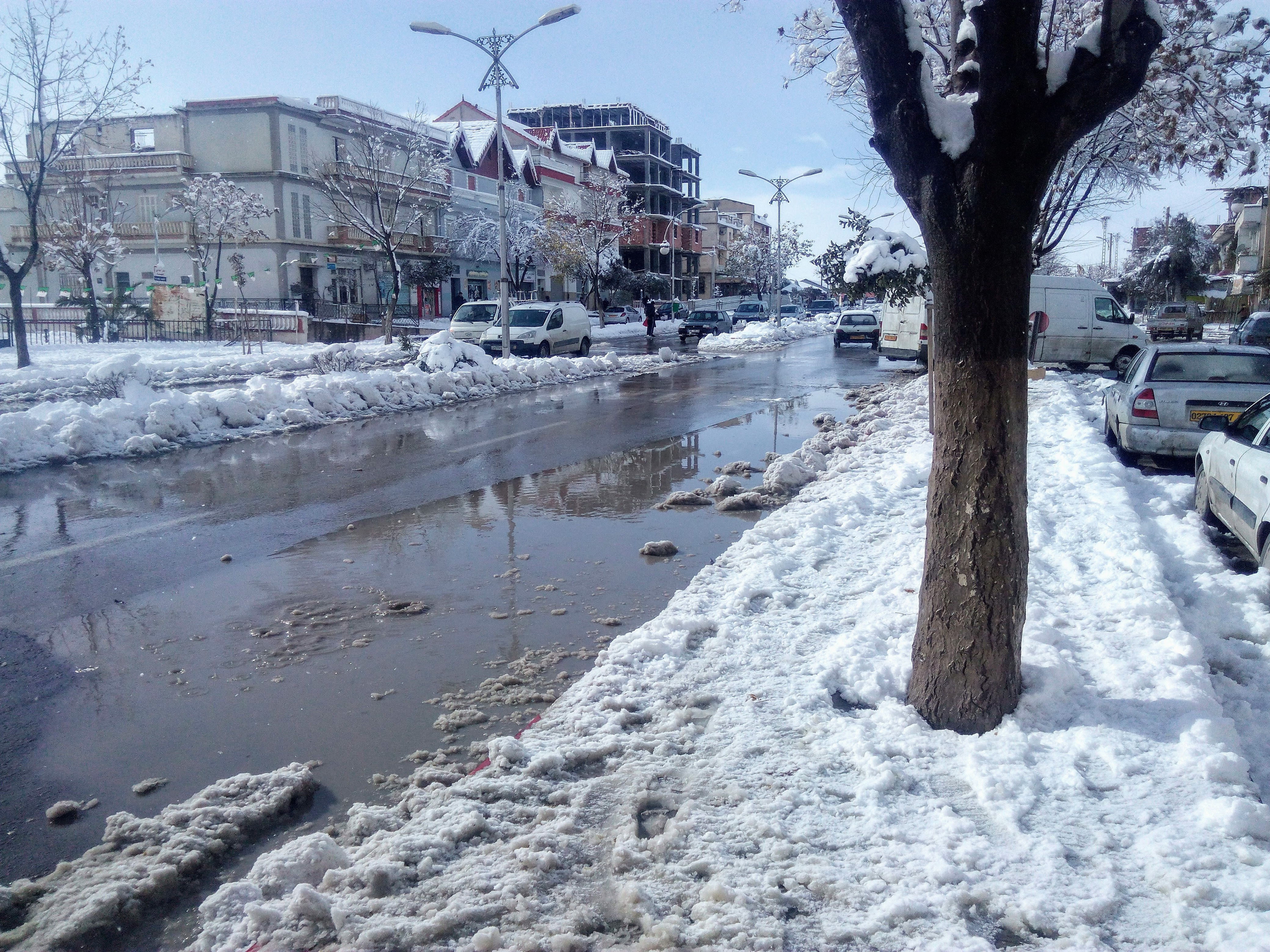 صورة عين أرنات (الطريق الوطني رقم 5)